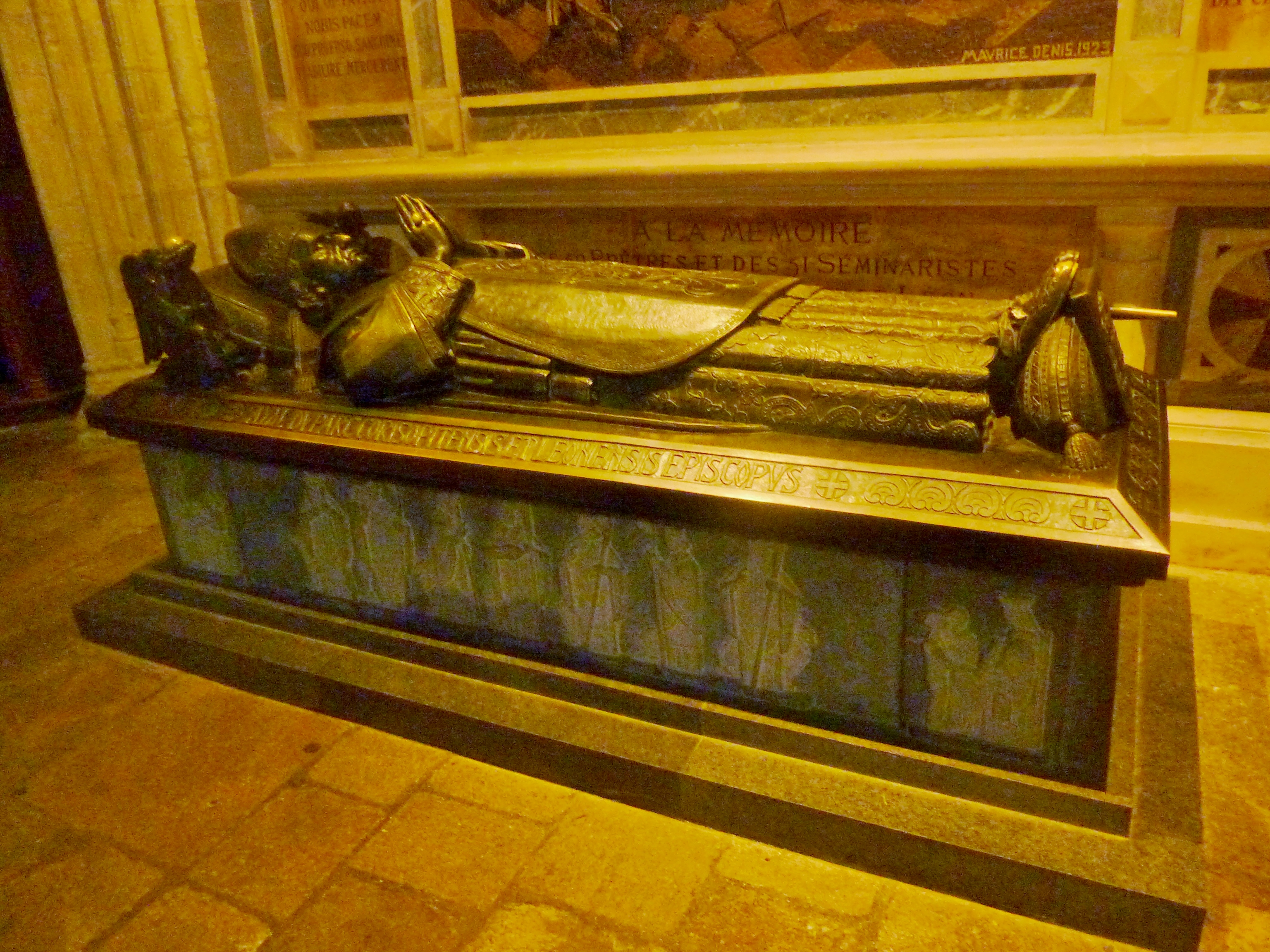 Cathédrale Saint-Corentin de Quimper : le tombeau de Mgr Duparc